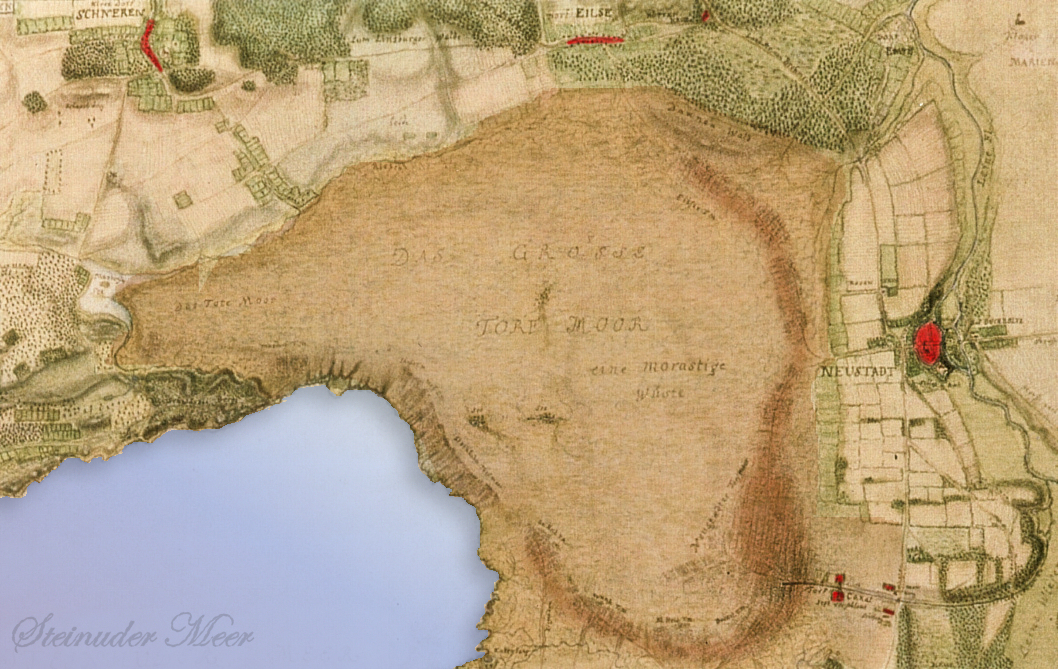 Totes Moor 1770, bezeichnet als Großes Torfmoor, eine morastige Wüste, dunkelbrauner Randstreifen als bäuerlicher Torfstich, rechts Neustadt.